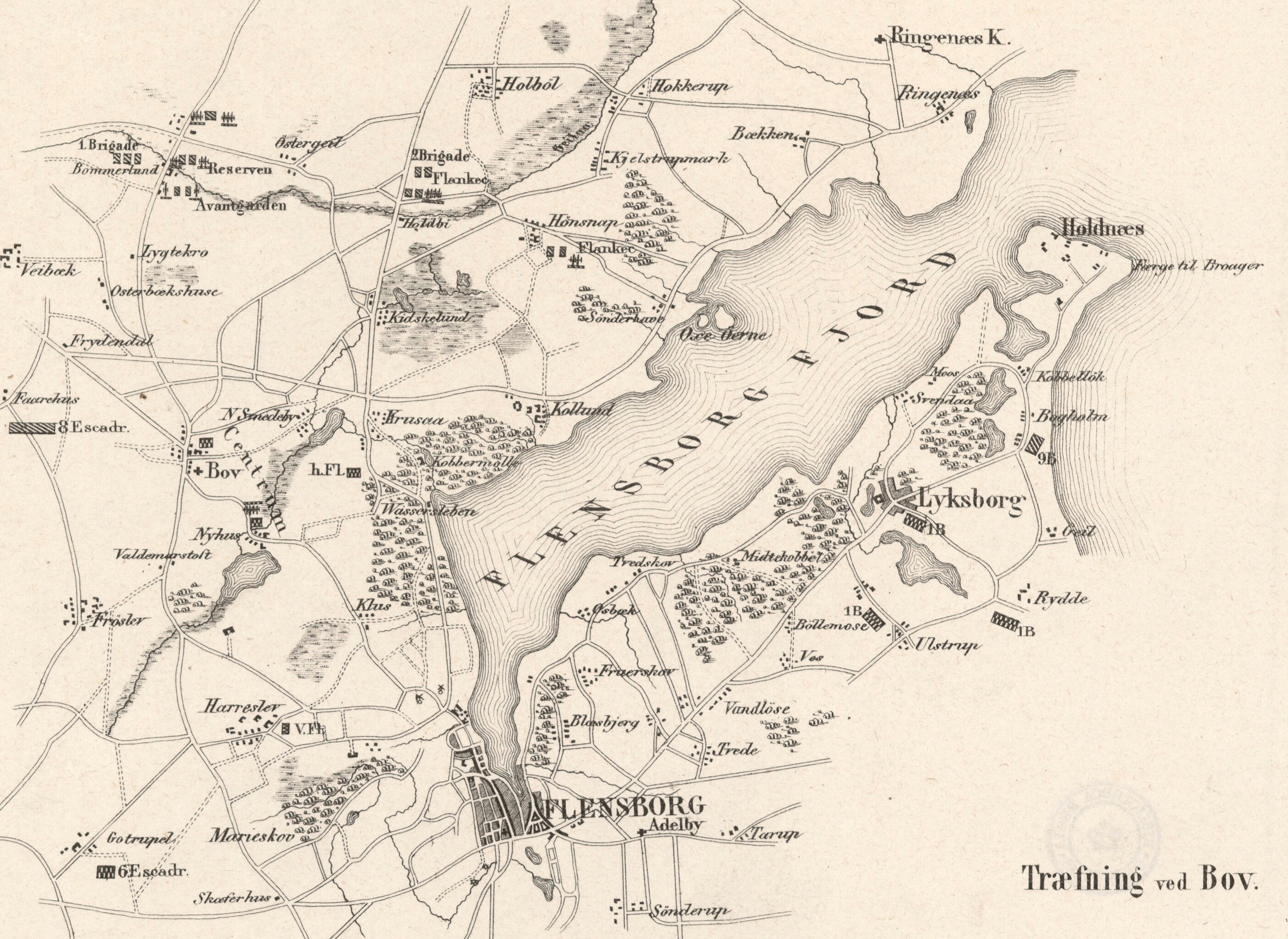 Træfning ved Bøv - Oversigtskort